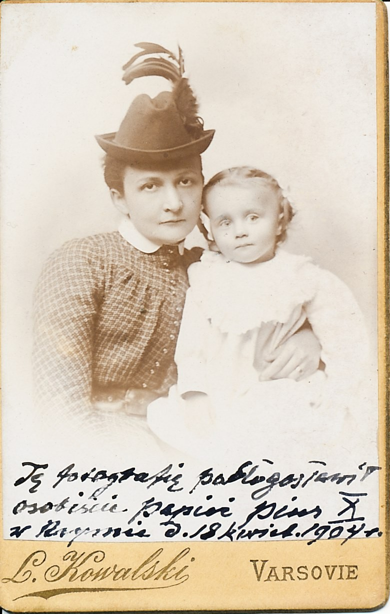 Maciej Masłowski and his mother, photograph of 1904